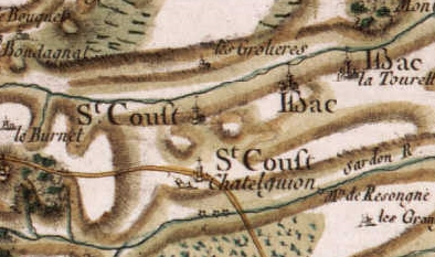 Châtel-Guyon Saint-Coust (actuellement commune de Châtel-Guyon dans le canton de Riom-Est, département du Puy-de-Dôme) sur la carte de Cassini (extrait).